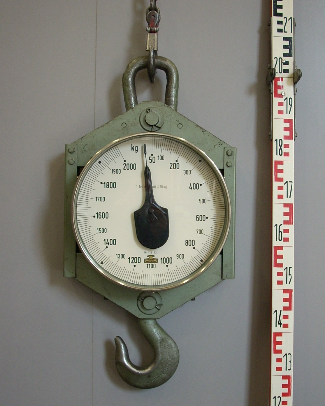 Kranwaage (System: Federwaage). Hersteller: Albert Jordan, Frankfurt. Höchstlast: 2000 kg. Teilung: 10 kg. Ablesbarkeit: 5 kg. Nivellierlatte zum Größenvergleich.